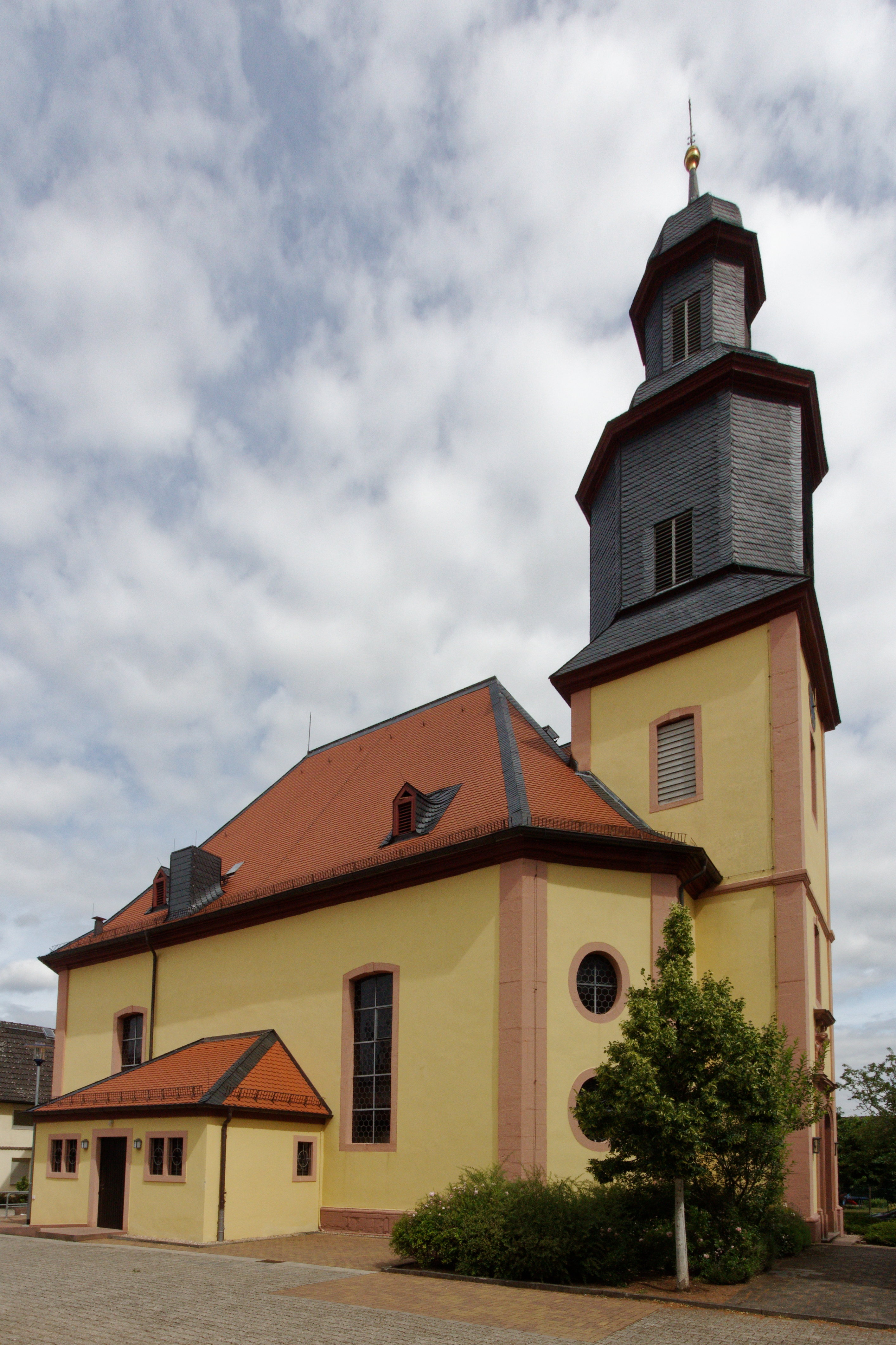 Evangelische Kirche in Dudenhofen, einem Stadtteil von Rodgau (Hessen). Blick aus Südosten vom Backhaus aus. In dem kleinen Vorbau befindet sich die Sakristei.